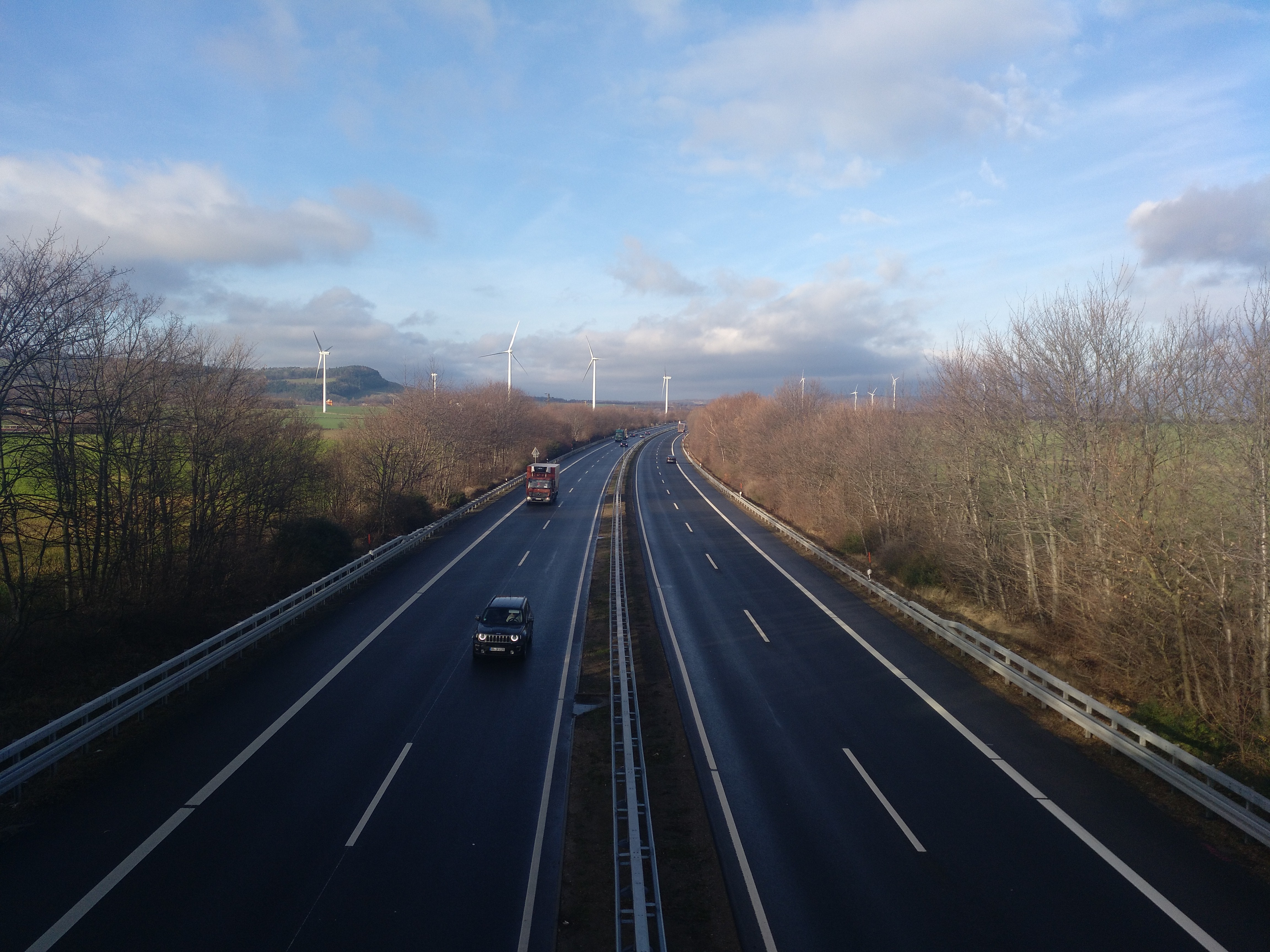 Die Bundesstraße 6 bei Harlingerode, Westblick Richtung Goslar/Immenrode, Dezember 2018. Im Hintergrund der Windpark Harlingerode.